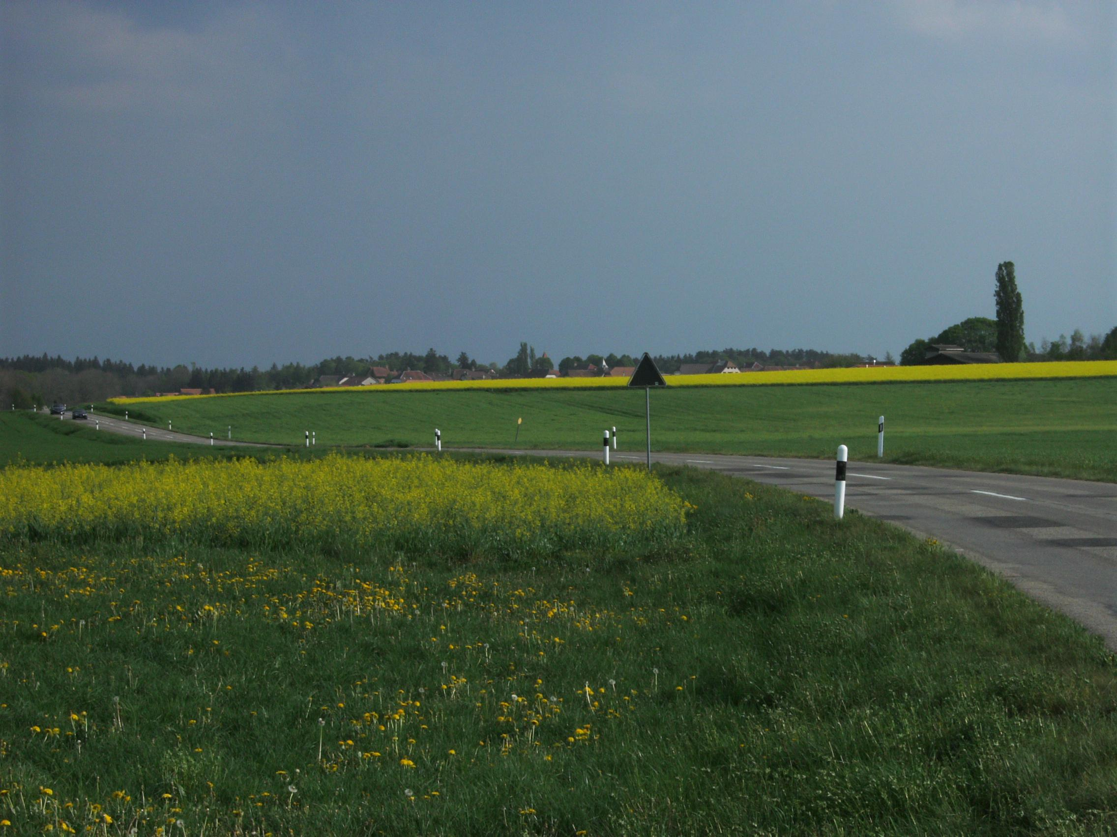 Neuchâtel, (NE, Suisse), depuis le Plateau de Diesse.